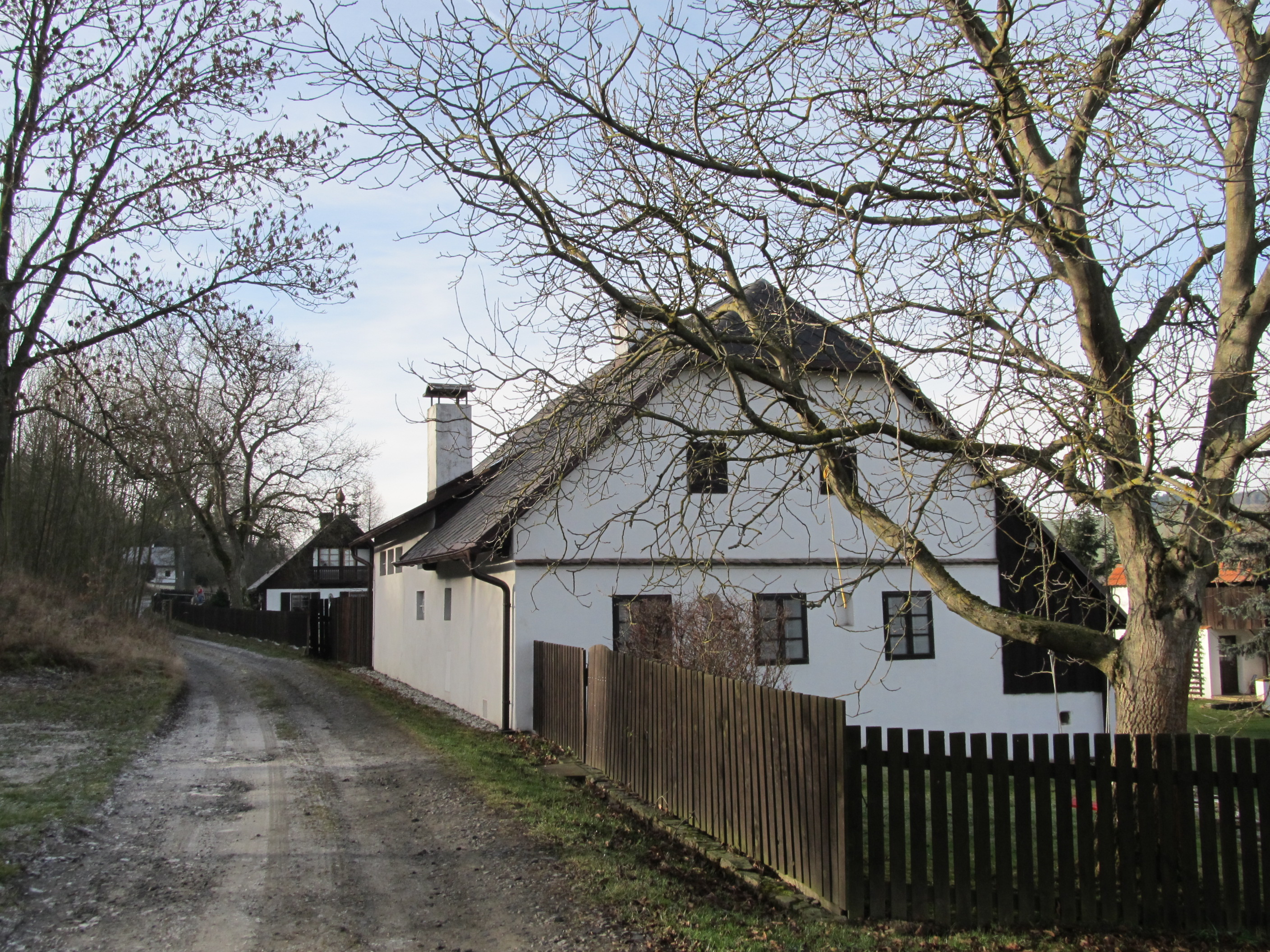 Dlažov - usedlost č. 83